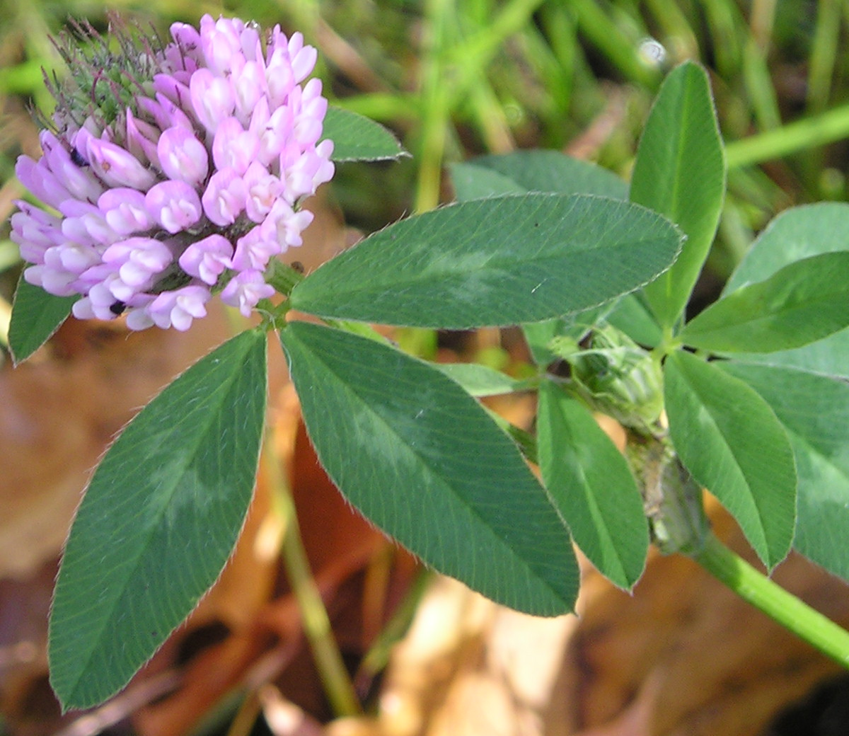 Blüte von Trifolium pratense (Rotklee)